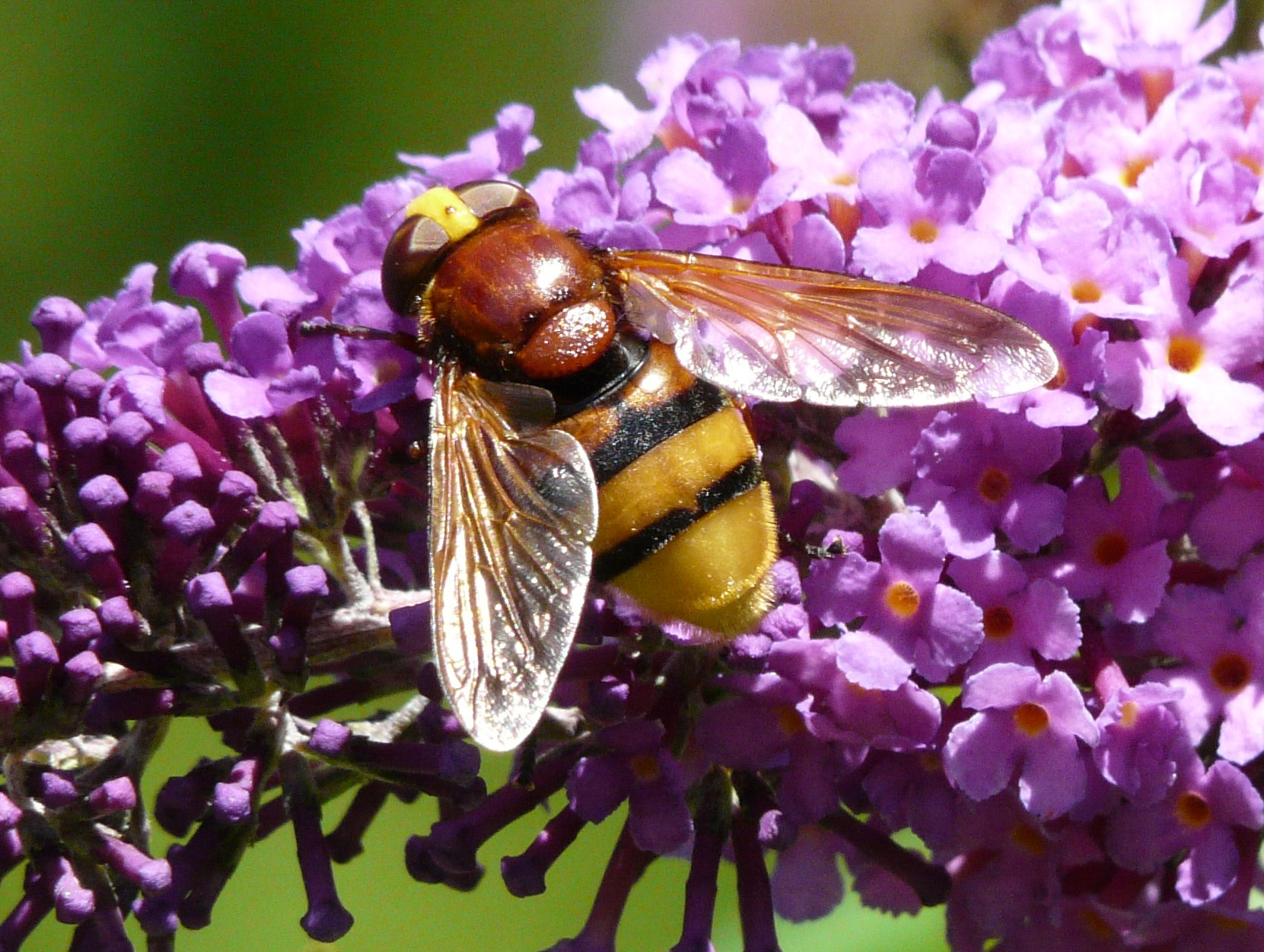 Volucella zonaria sur les fleurs d'un buddléia de David (Buddleja davidii), Dordogne, France